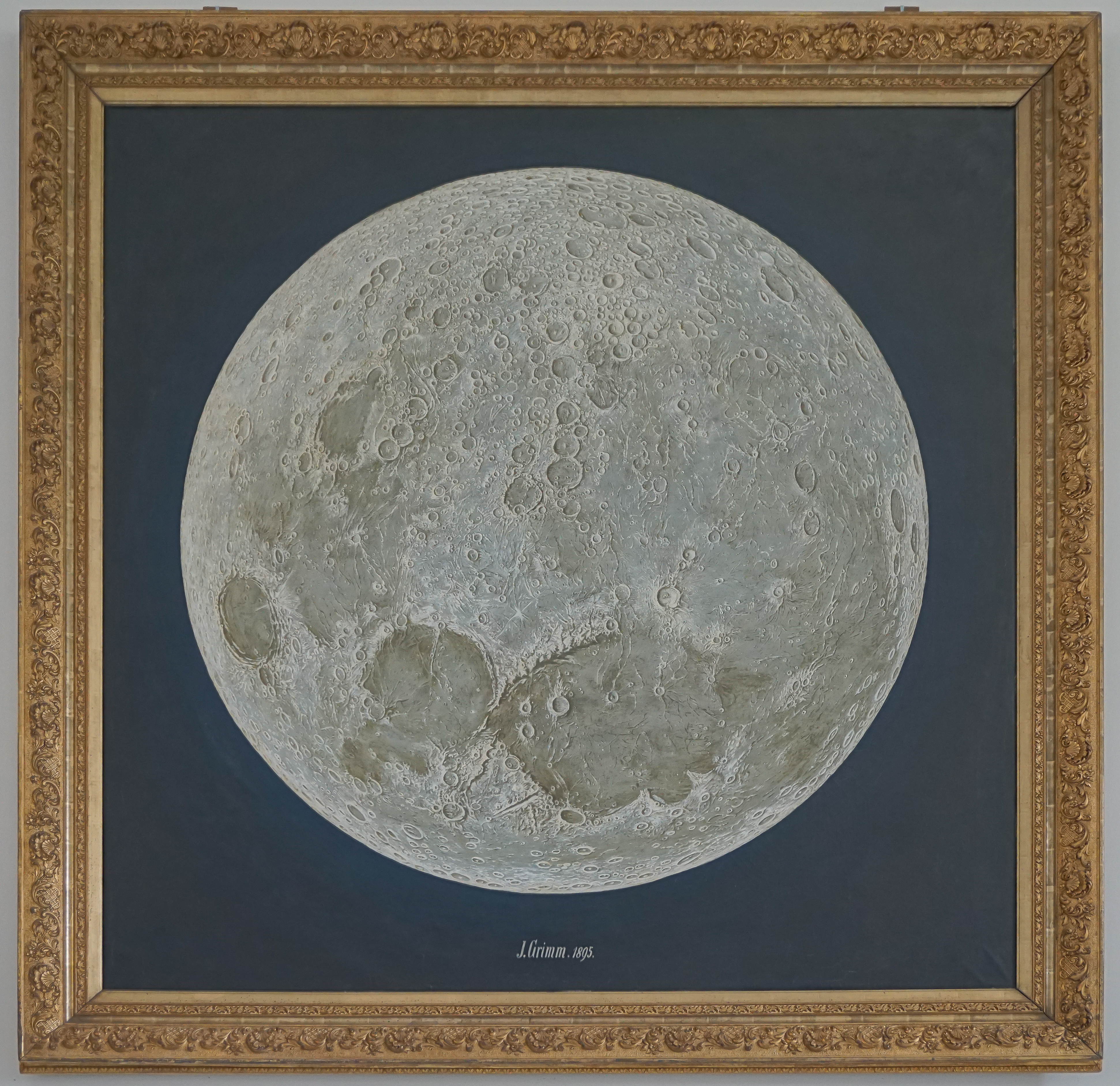 MUT: Museum der Universität Tübingen - Alte Kulturen - Sammlungen im Schloss Hohentübingen, Julius Grimm: Ansicht des vollen Mondes, Öl auf Leinwand, 1895, Gemäldesammlung der Universität